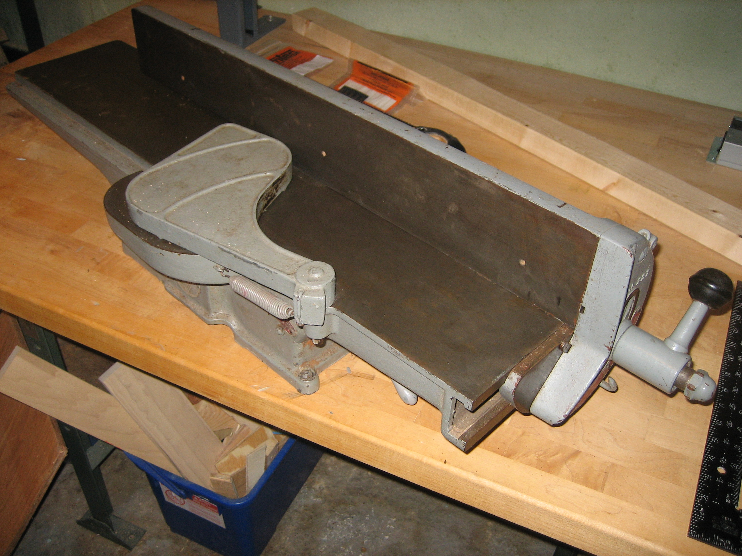 An old-looking benchtop jointer